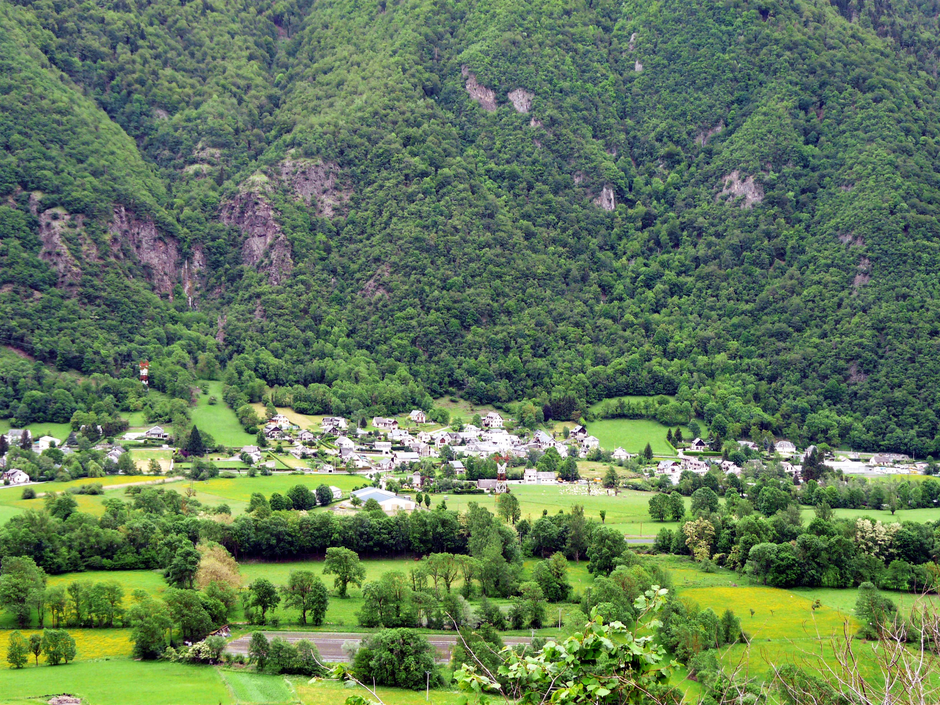 Le village de Moustajon en vallée de Luchon, Haute-Garonne, France.